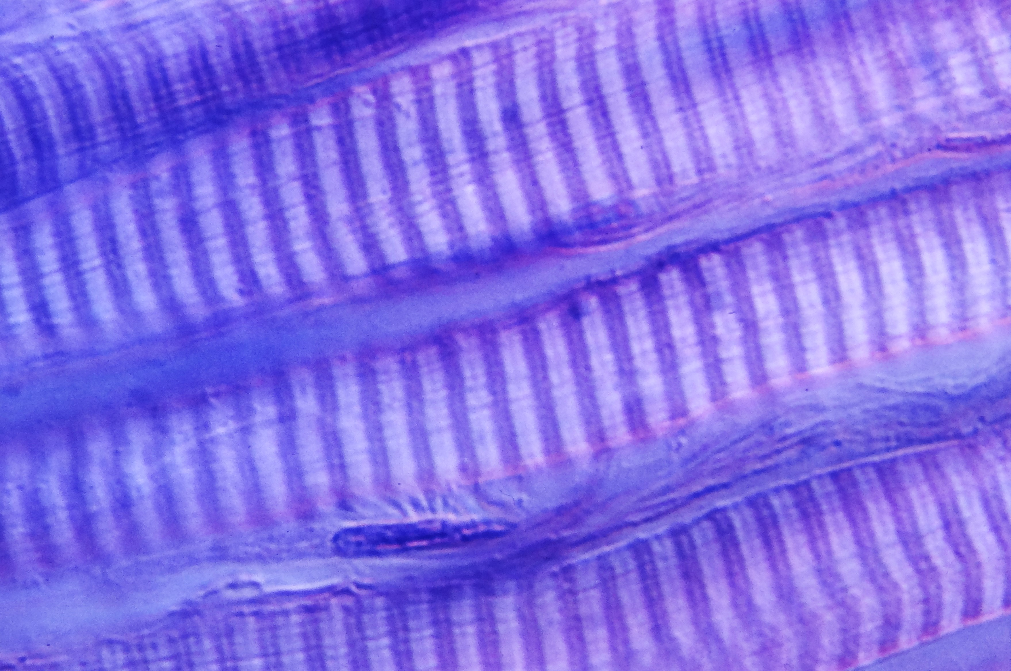 Lichtmikroskopischer Längsschnitt quergestreifter Muskelzellen bei starker Vergrößerung (Hämatoxylin-Eosin-Färbung, Interferenzkontrast)